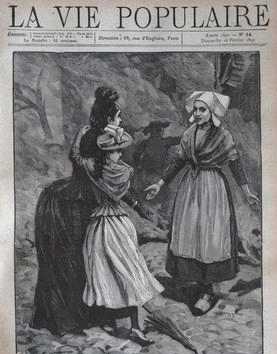 Illustration anonyme d'un conte d'Octave Mirbeau (1848-1917), « Le Nid de frelons », paru dans "La Vie populaire" le 16 février 1890.